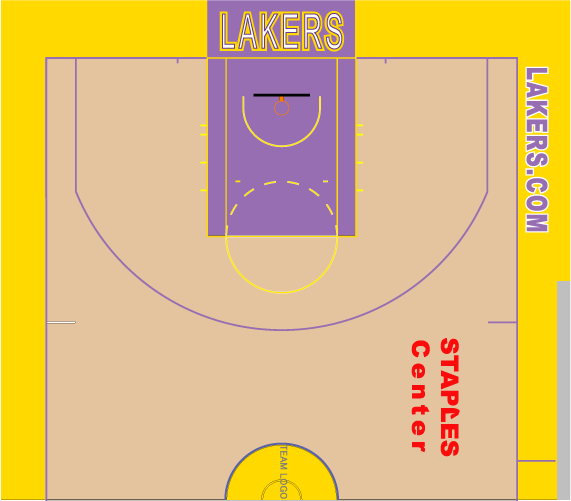 レイカーズホームコートカラーリング